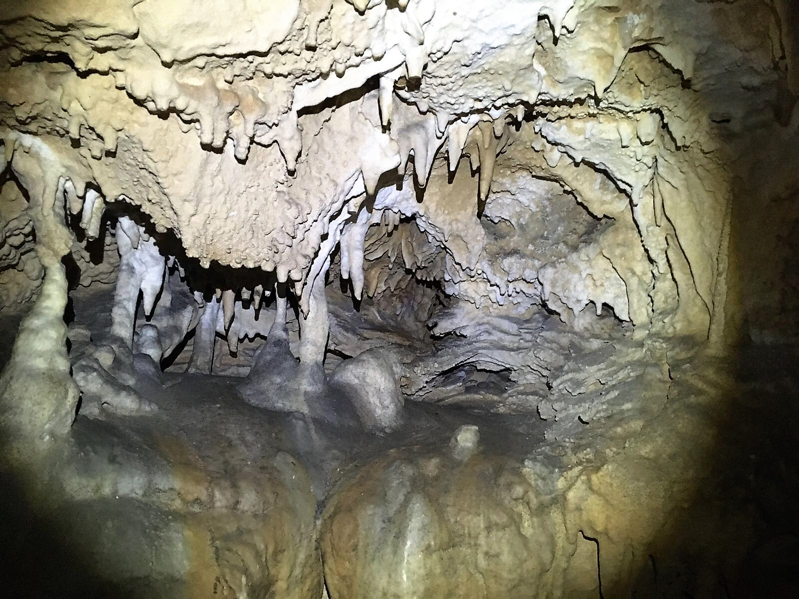 stalattiti e stalagmiti